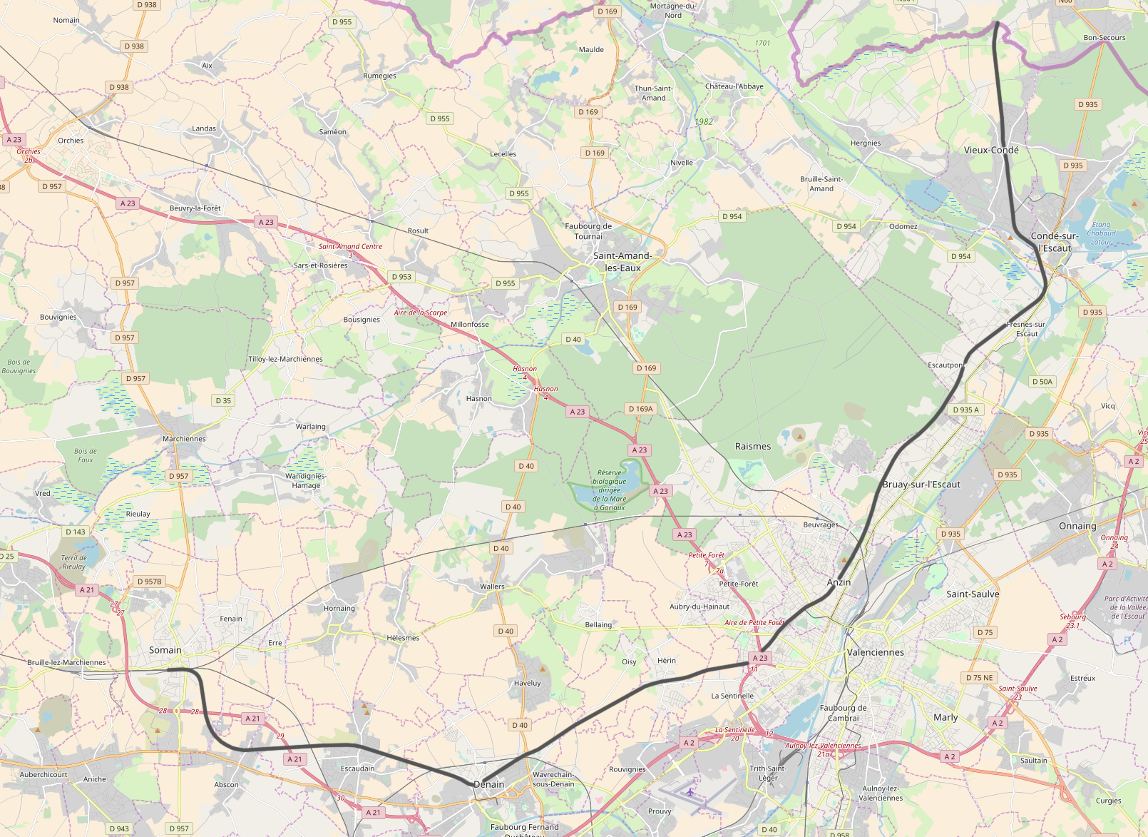 Somain - Vieux-Condé Railway Line